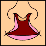 Bilateral complete cleft lip (left side)